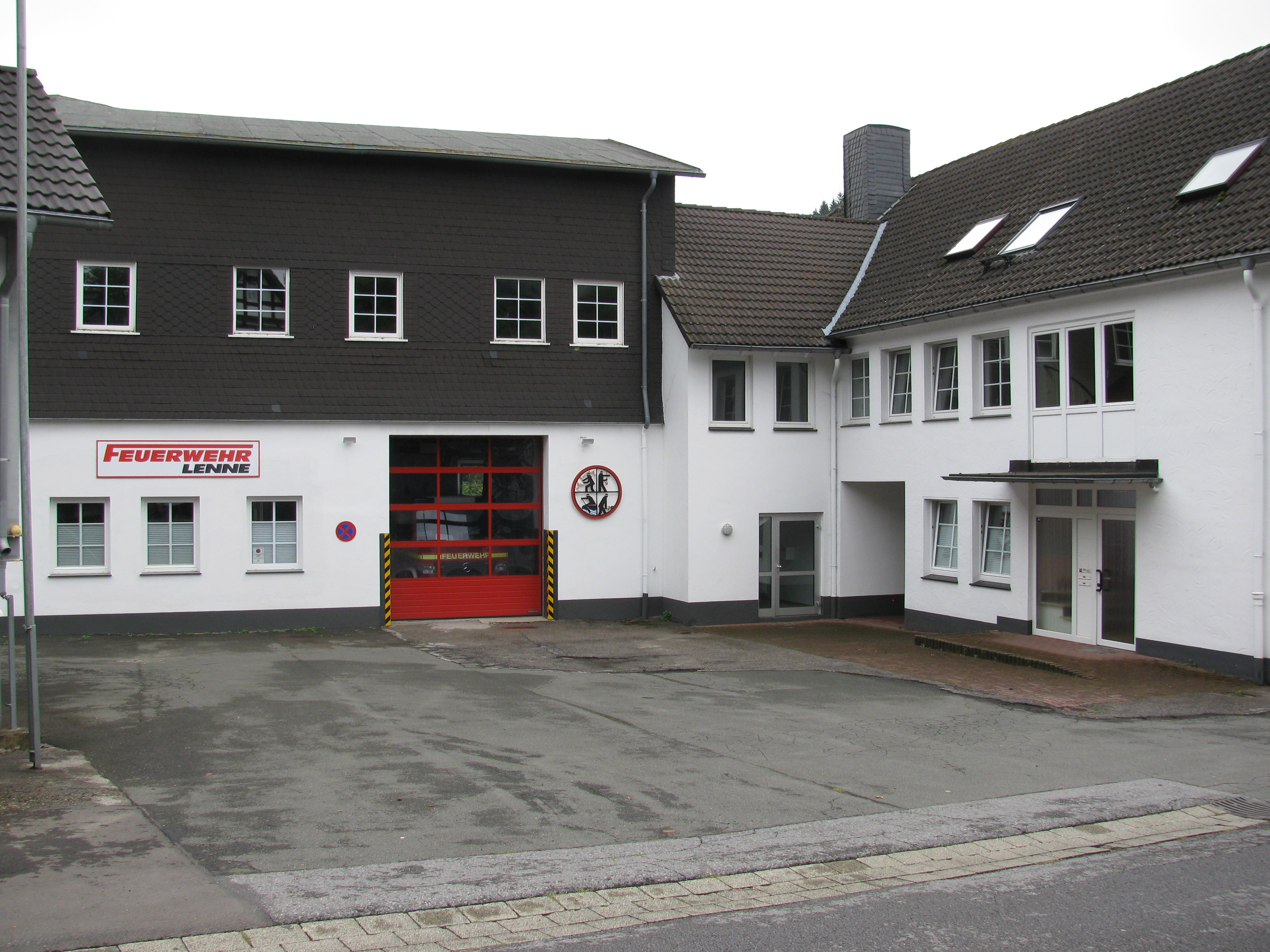 die Feuerwehr von Lenne im Gebäude Uentropstraße 1